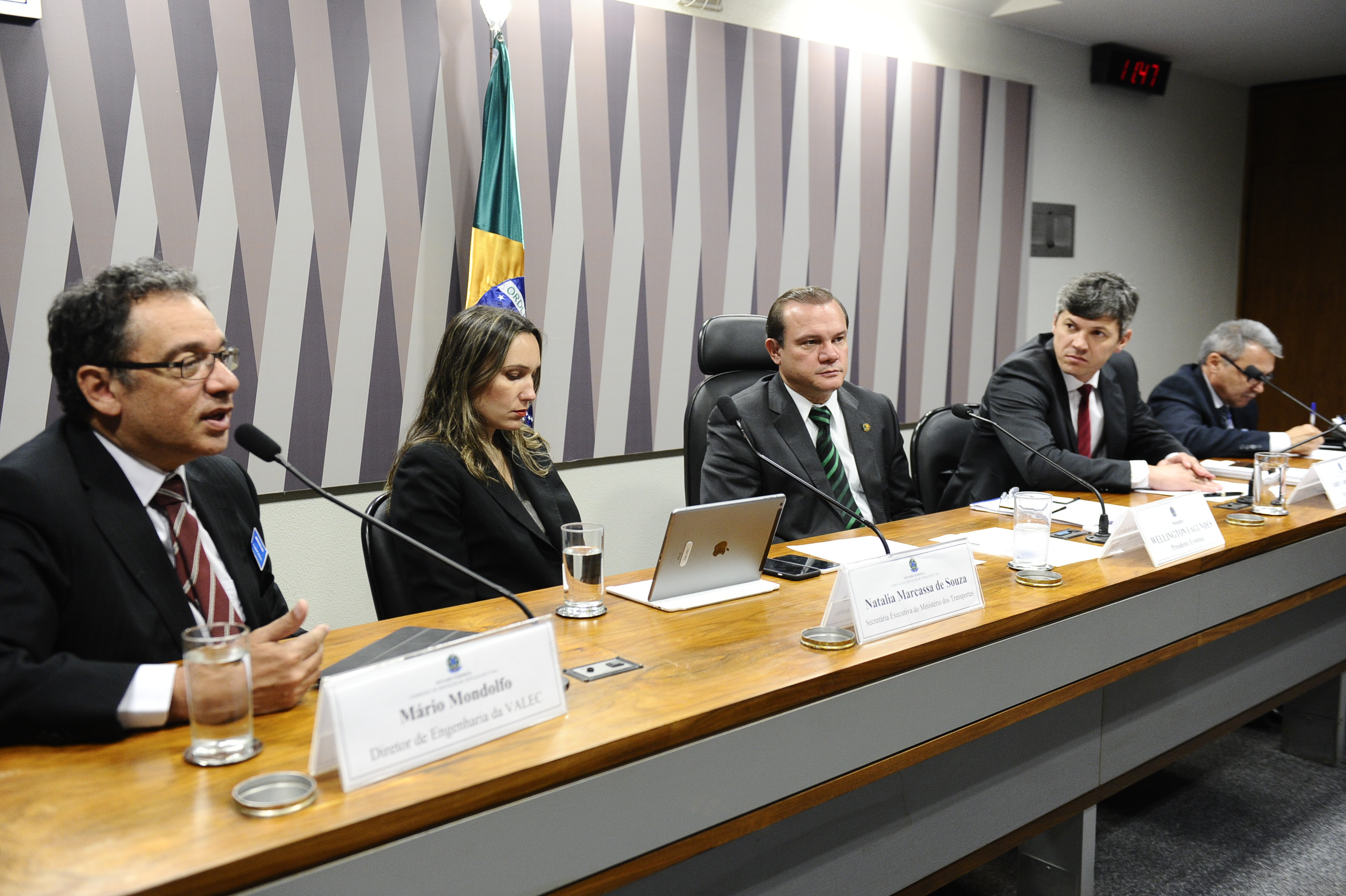 Comissão de Serviços de Infraestrutura (CI) realiza audiência pública para discutir, no âmbito da avaliação do Plano Nacional de Logística de Transportes, as razões dos atrasos e abandonos de obras públicas no Brasil, e tratar do cronograma das obras atuais sob responsabilidade do Governo Federal. Mesa (E/D): diretor de Engenharia da Valec Engenharia, Construções e Ferrovias S.A, Mário Mondolfo; secretária executiva do Ministério dos Transportes, Natália Marcassa de Souza; presidente eventual da CI, senador Wellington Fagundes (PR-MT); diretor-geral do Departamento Nacional de Infraestrutura de Transportes (Dnit), Valter Casimiro Silveira; coordenador-geral de Infraestrutura do Tribunal de Contas da União (TCU), Arsenio José da Costa Dantas Foto: Marcos Oliveira/Agência Senado